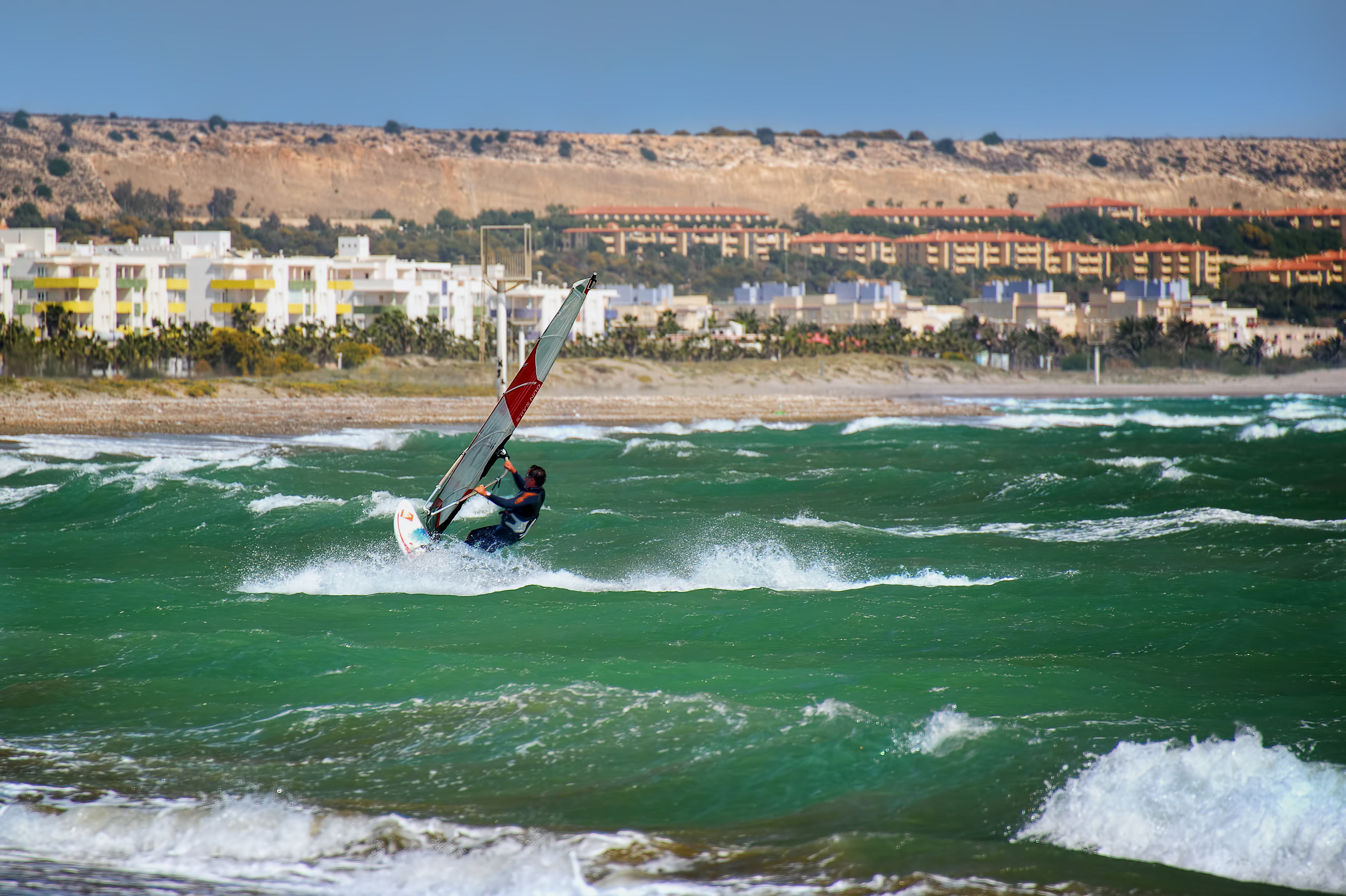 Almerimar